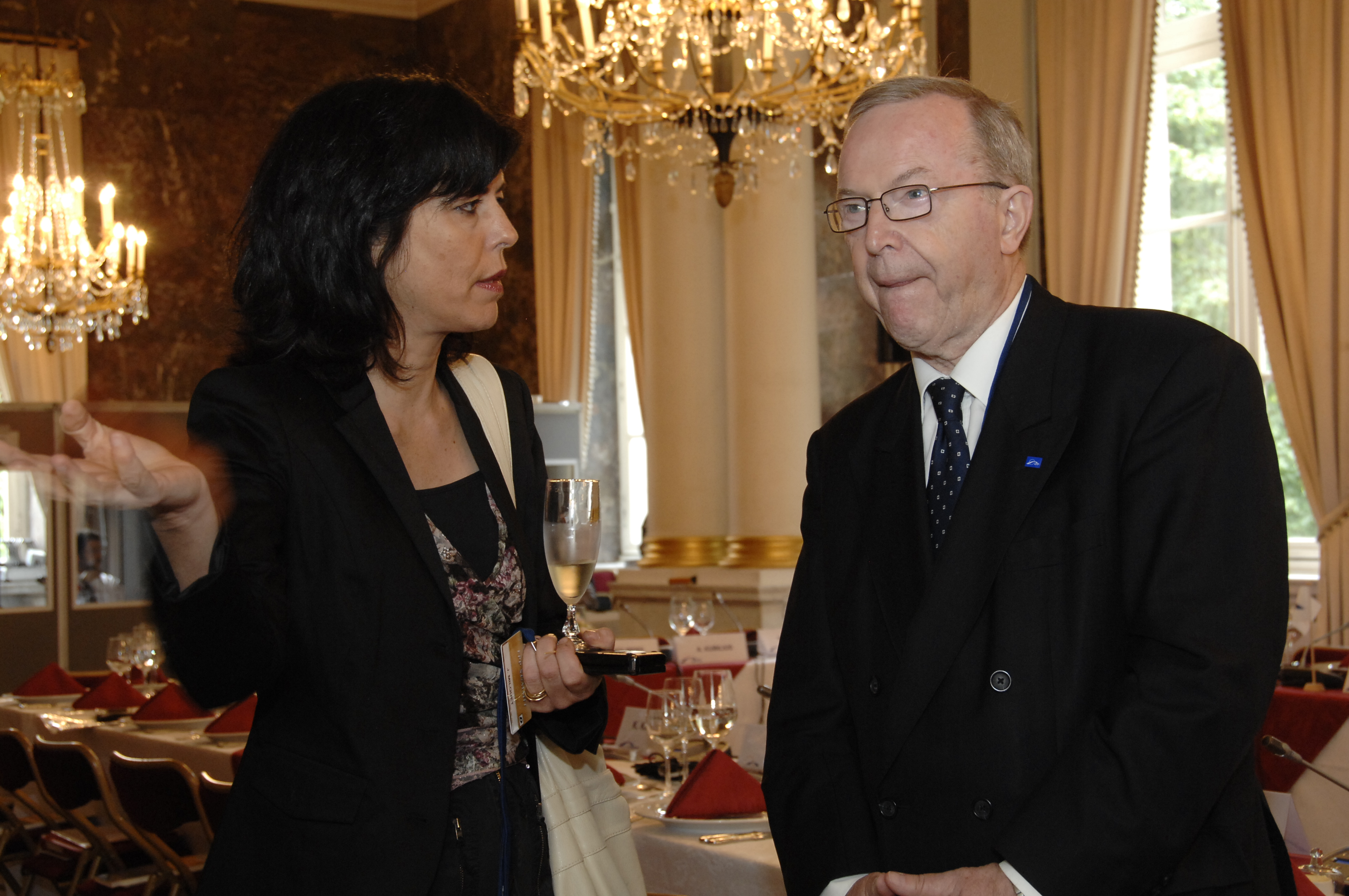 EPP Summit 19 June 2008